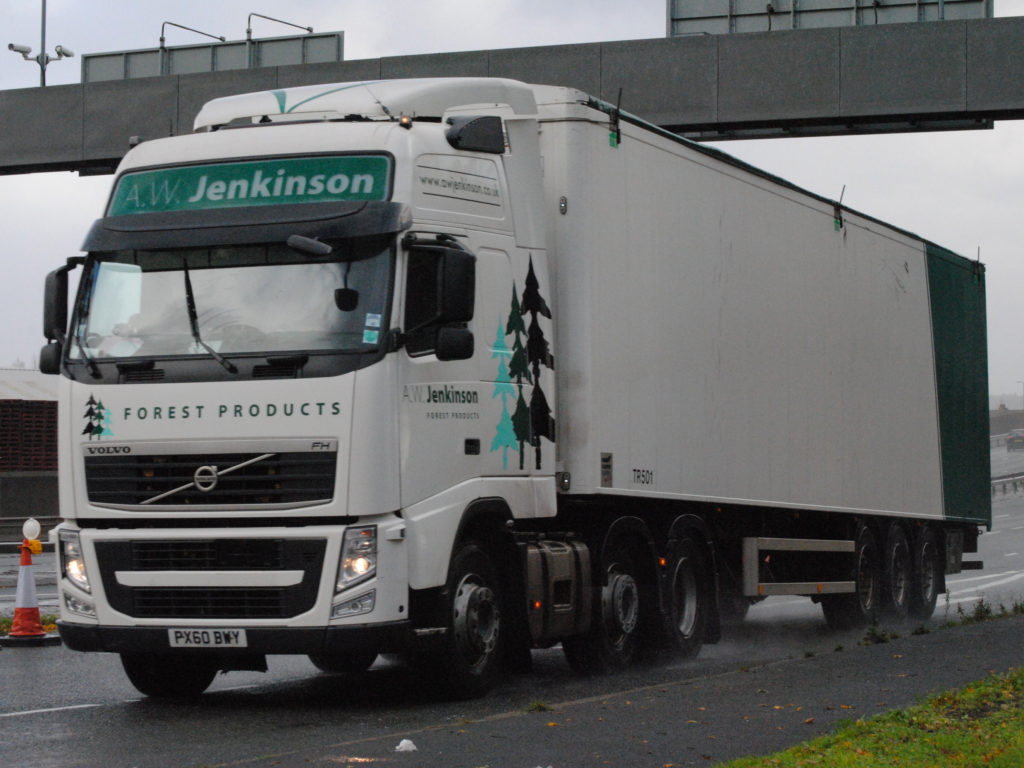 Volvo FH13. seen here in Widnes